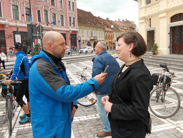 Gurul a Rádió